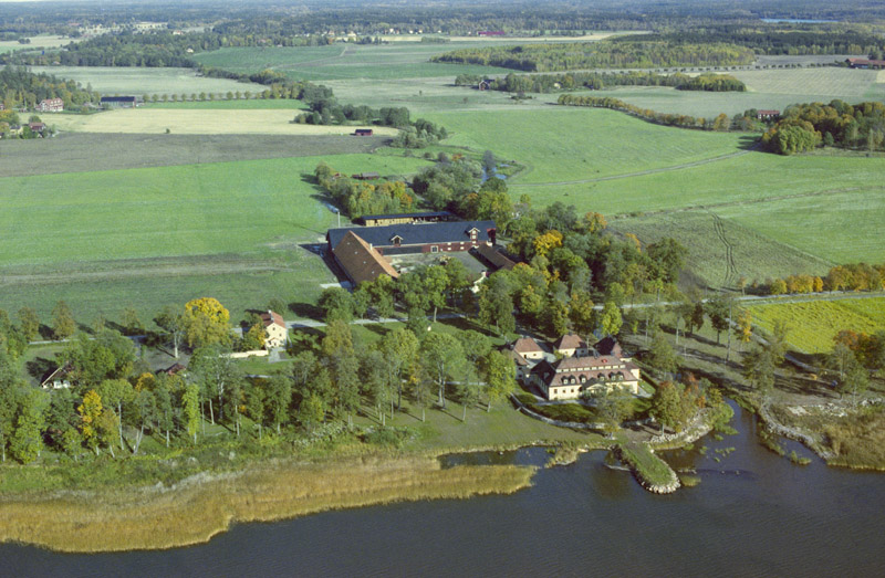 Gimmersta herrgård. Bilden är tagen mot (väderstreck): Ö Motiv: Gimmersta Nyckelord: Flygbilder, Riksintressen Kategori: Slättbygd, Herrgårds-/slottslandskapGimmersta herrgård. Bilden är tagen mot (väderstreck): Ö.